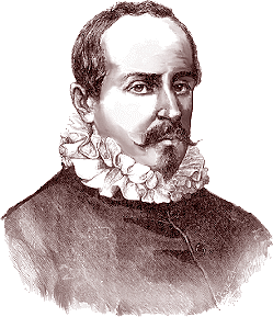 Portrait du dramaturge espagnol Juan Ruiz de Alarcón y Mendoza (1581-1639)